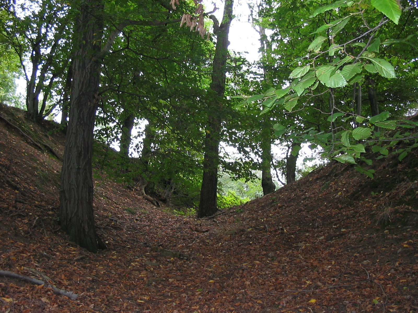 Im tiefen Graben des Todhübel, links Wirtschaftshoffläche, rechts Wehrturmfläche